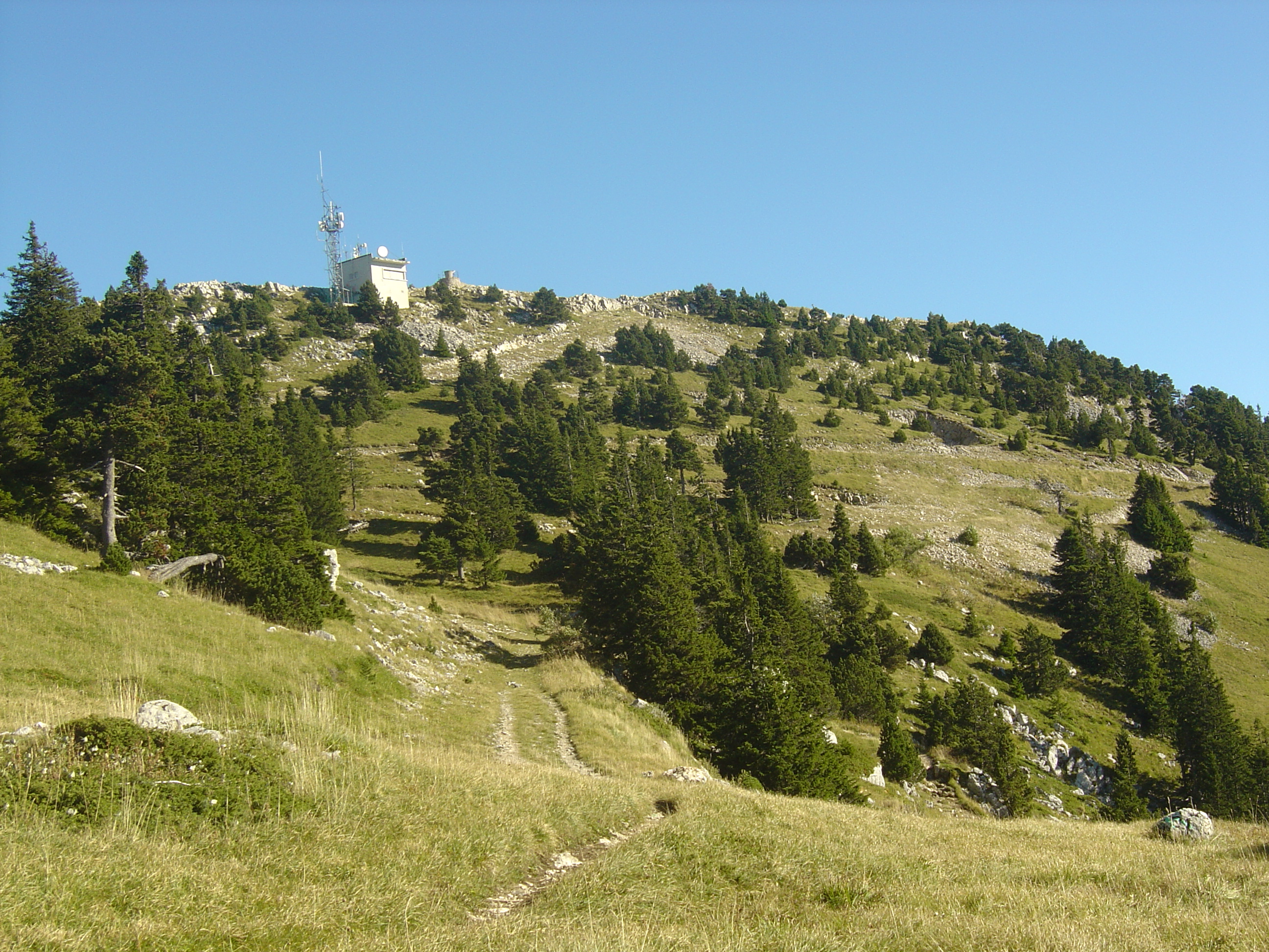 Plus haut le sommet du Moucherotte (1901m) au milieu des conifères.